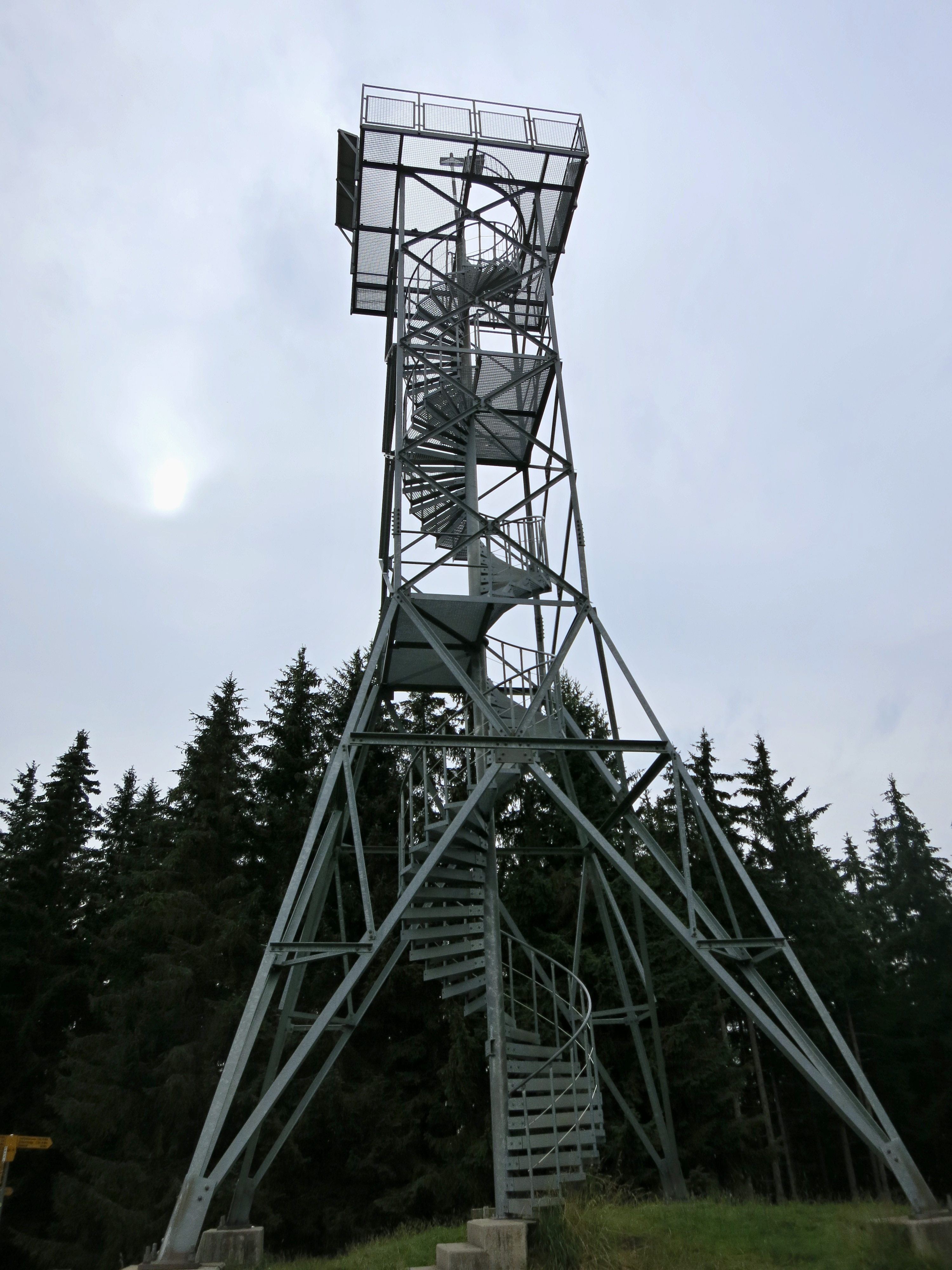 Bluemeturm